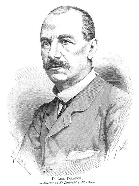 Luis Polanco, grabado publicado en la revista española La Ilustración Española y Americana.